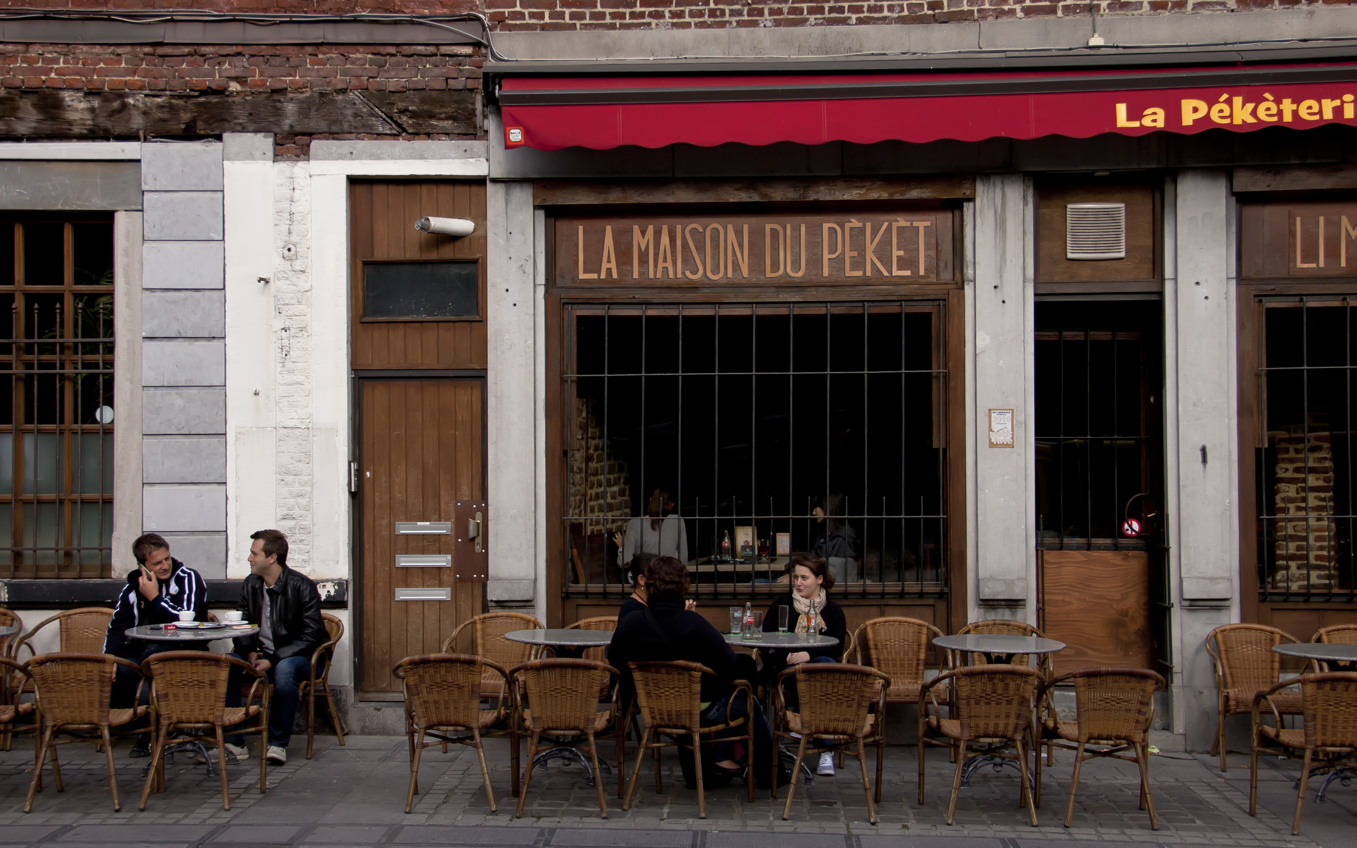 La maison du peket rue de l'Epée 4 4000 Liège België. Un établissement spécialisé dans les pekets.